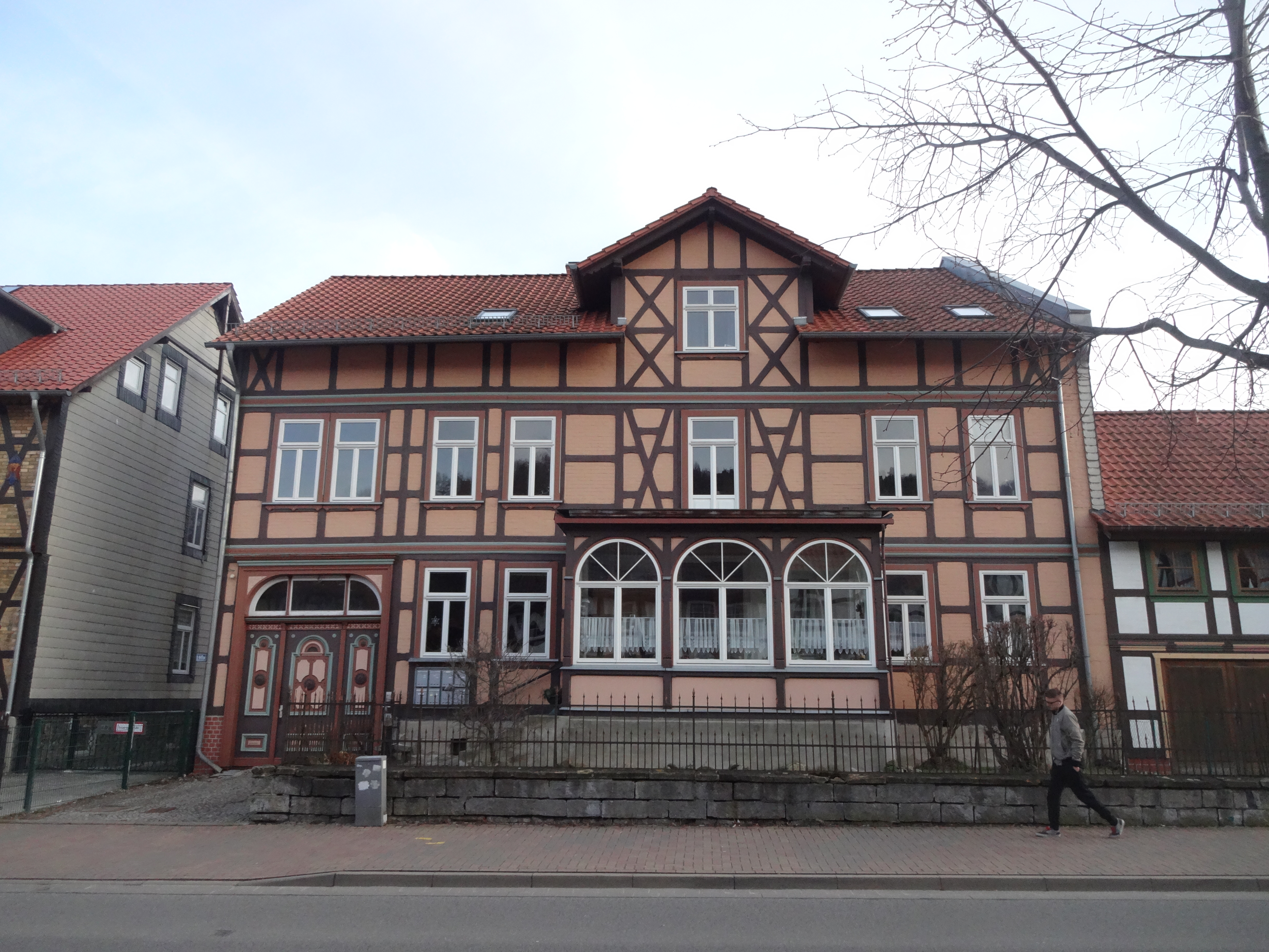 ehemals denkmalgeschütztes Wohnhaus in der Friedrichstraße 41 in Wernigerode